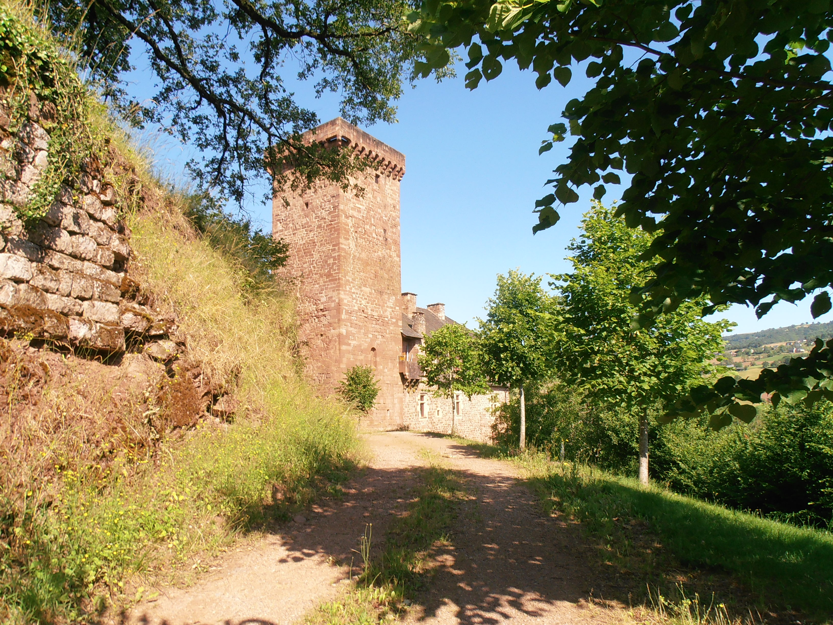 Château de la Servairie à Mouret .